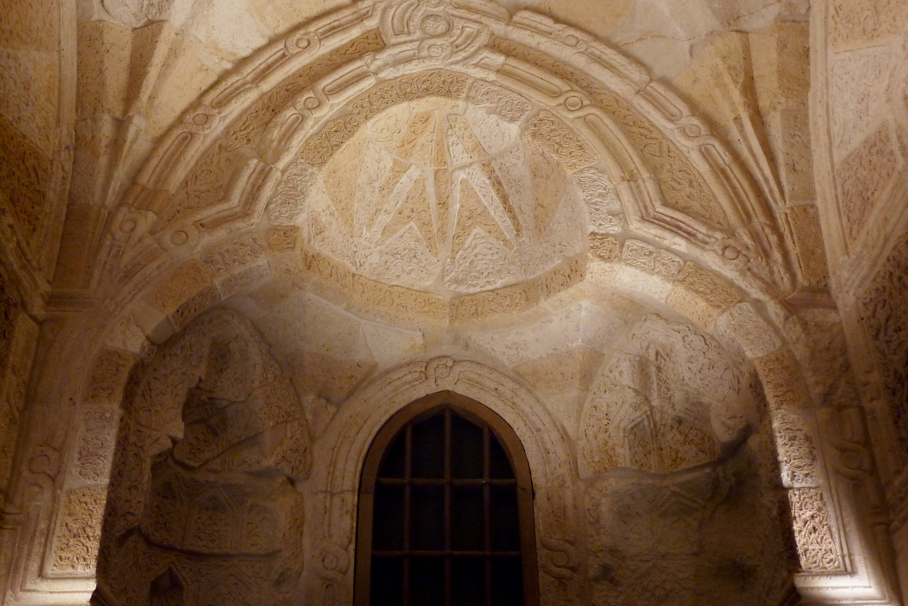 Porche Mamlouk, Torbau eines Wohnhauseses in Kairo aus der 2. Hälfte des 15. Jahrhunderts; Abteilung Kunst des Islam im Louvre in Paris